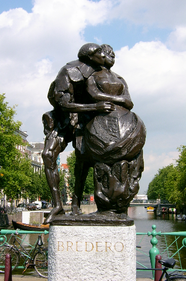 Eigenwerk: PD; Bredero (1968) by Piet Esser in Amsterdam